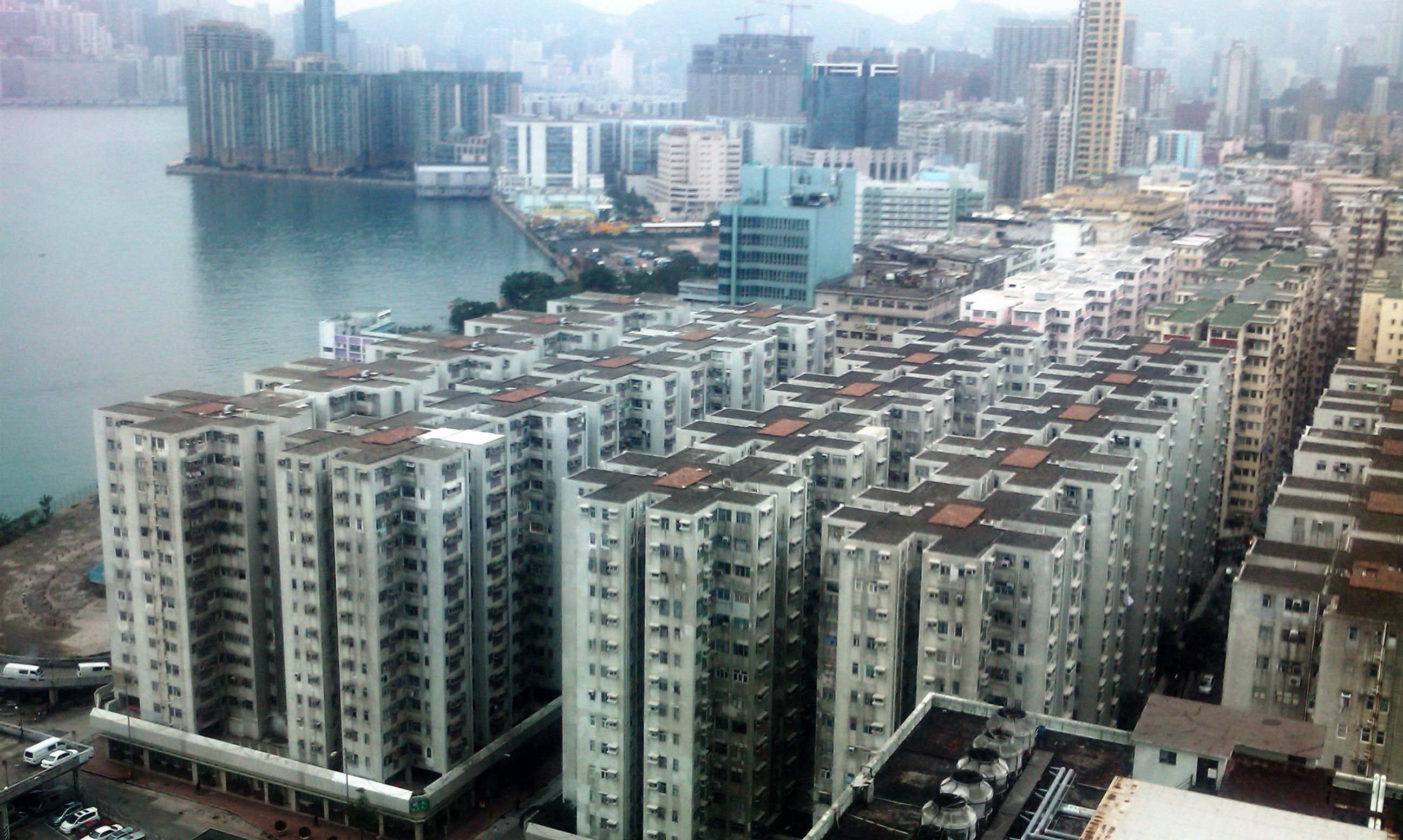 中文（香港）: Wyler Gardens 2009 ,kowloon ,Hong Kong